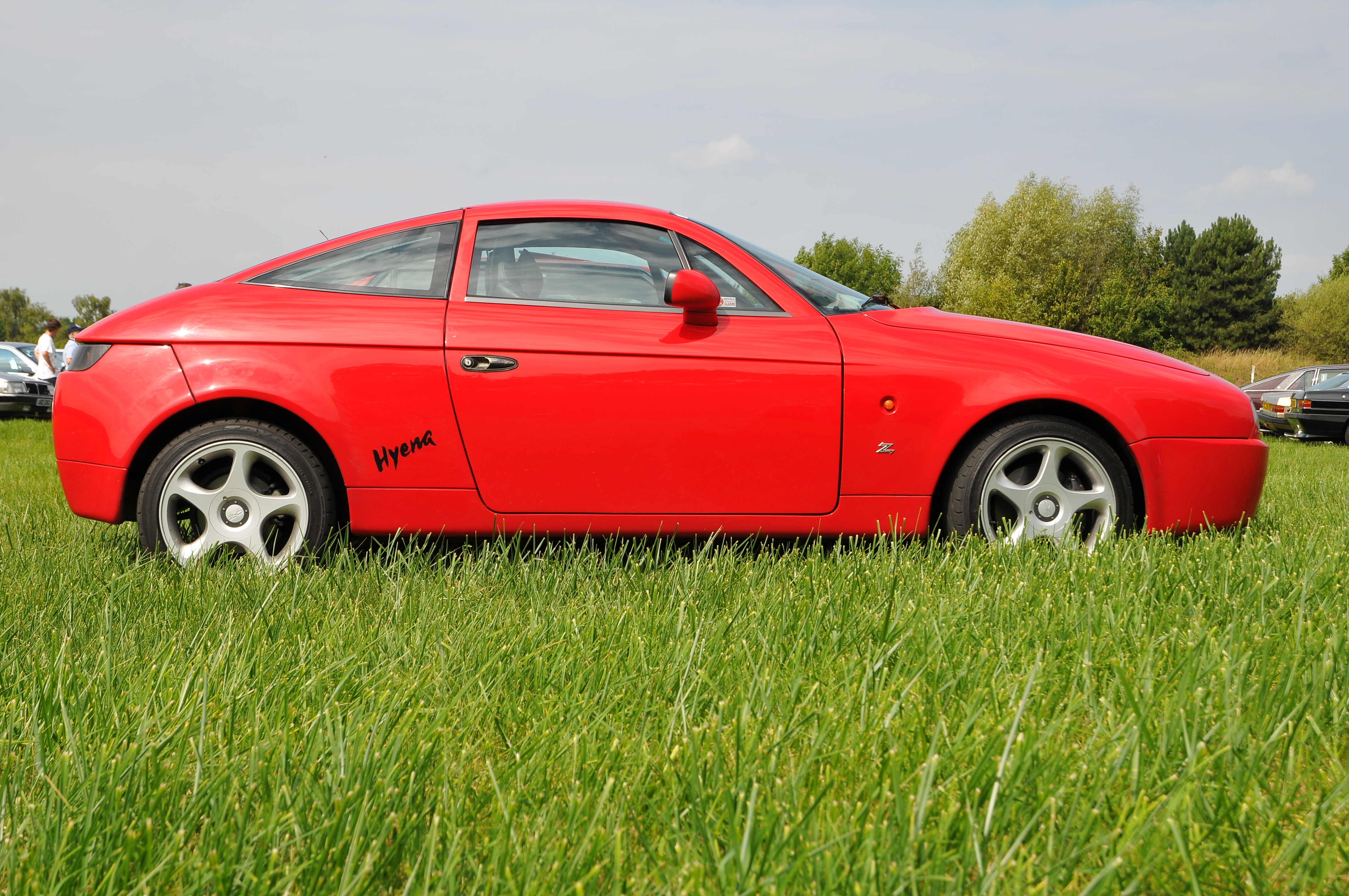 Lancia Motor Club AGM 2011